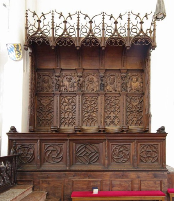 Salzburger Str. 32, 83435 Bad Reichenhall, Münster St. Zeno Genehmigung für Innenaufnahmen durch Erzbischöfliches Ordinariat München, Ressort Bauwesen und Kunst vom 21.08.2012 liegt schriftlich vor.This is a photograph of an architectural monument.